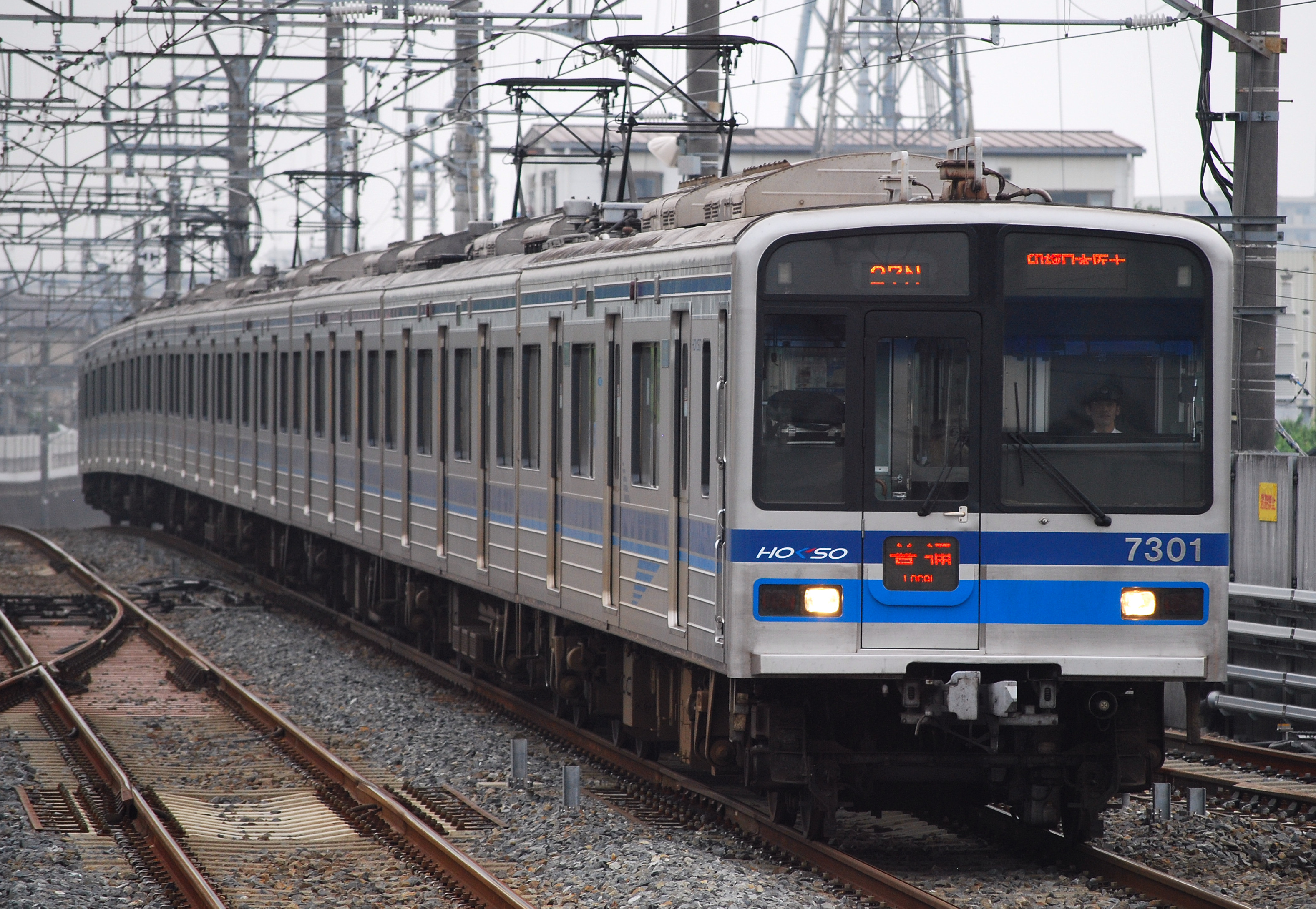 北総鉄道の7300系（東松戸駅にて）